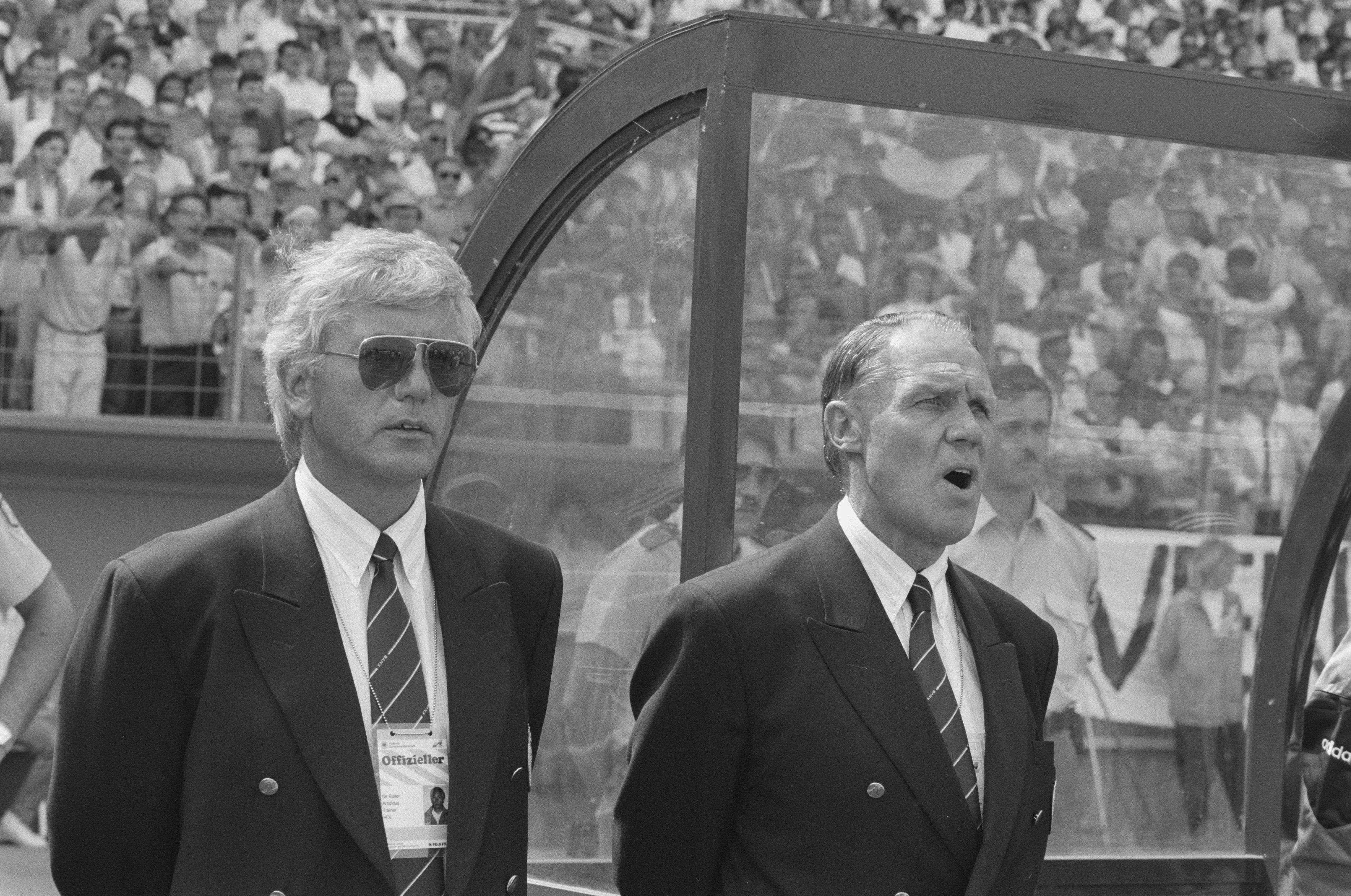 Collectie / Archief : Fotocollectie Anefo Reportage / Serie : [ onbekend ] Beschrijving : EK voetbal in West Duitsland ; Nederland tegen Ierland 1 bondscoach Rinus Michels (r) en assistent Nol de Ruiter tijdens Wilhelmus Datum : 18 juni 1988 Locatie : Duitsland, Ierland Trefwoorden : sport, voetbal Persoonsnaam : Michels, Rinus, Nol de Ruiter Instellingsnaam : Wilhelmus Fotograaf : Bogaerts, Rob / Anefo Auteursrechthebbende : Nationaal Archief Materiaalsoort : Negatief (zwart/wit) Nummer archiefinventaris : bekijk toegang 2.24.01.05 Bestanddeelnummer : 934-2693